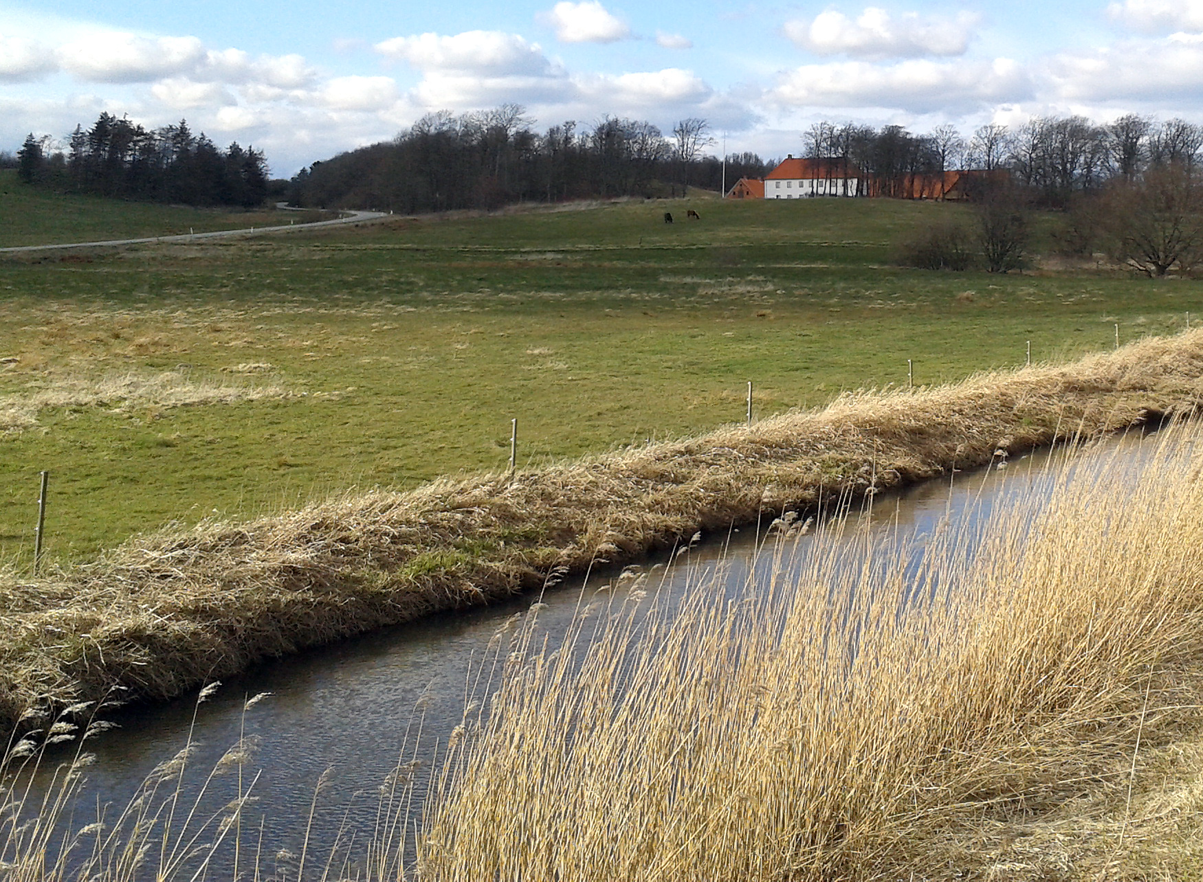 Jordbro Å neden for Strandet tæt ved Hjarbæk Fjord